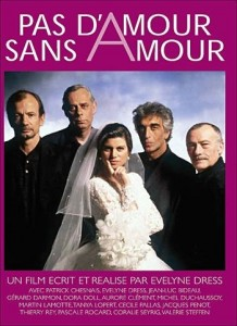 Affiche du film Pas d'amour sans amour réalisé par Évelyne Dress et sorti en 1993.